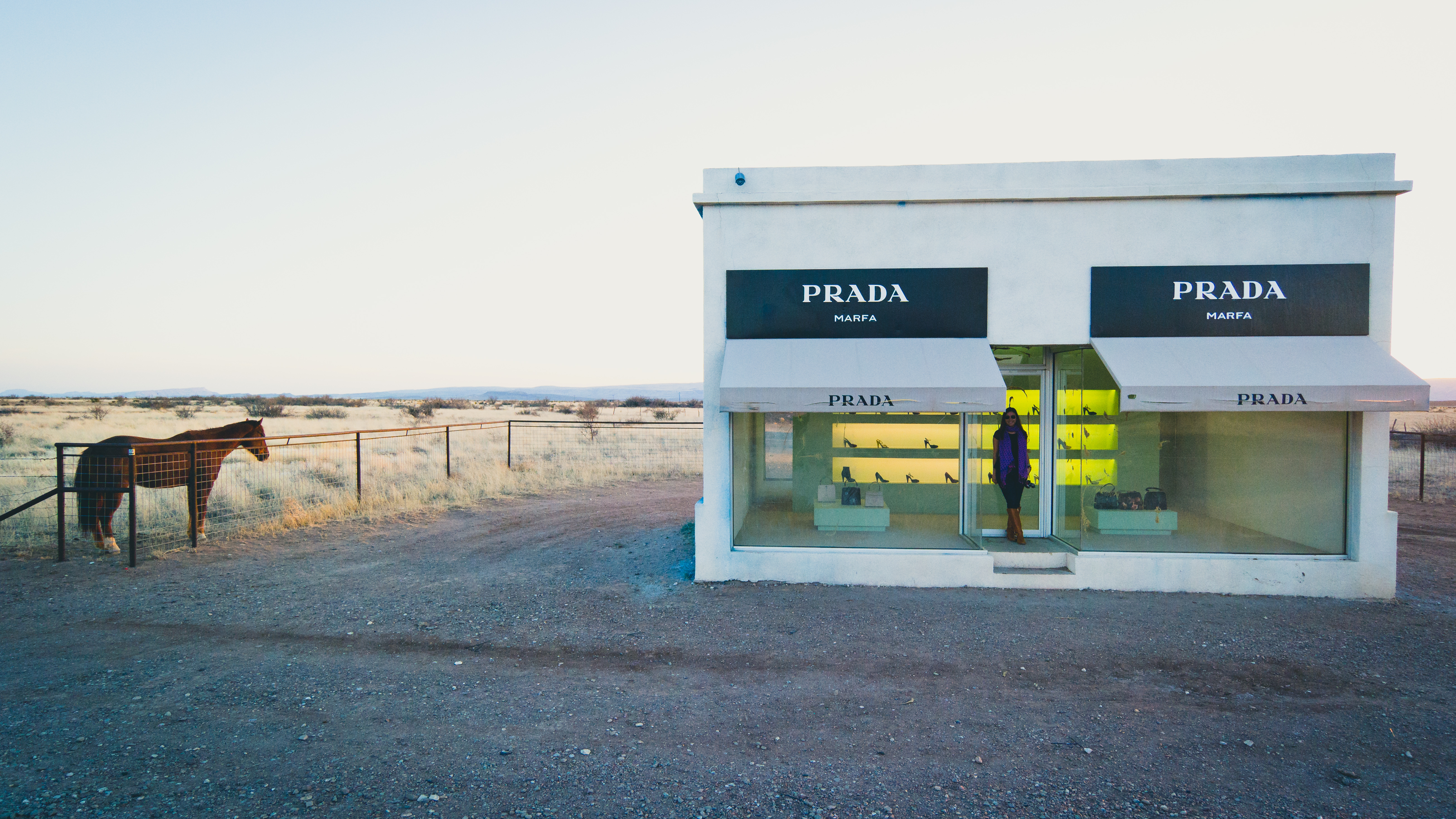 Prada Marfa